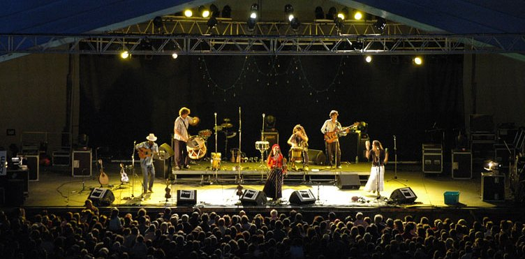 Concert du groupe Brésilien Renata Rosa sur la scène du grand large dans le cadre des Jeudis du Port